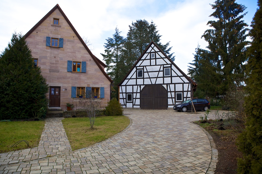 Ehem. Wohnstallhaus, erdgeschossiger, giebelständiger Sandsteinquaderbau mit Steilsatteldach, bez. 1860; Scheune, giebelständiger Fachwerkbau mit Steilsatteldach, bez. 1860.